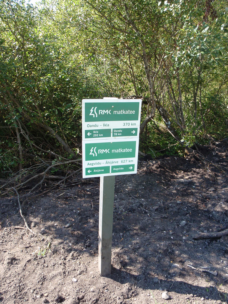 RMK matkatee tähistus Aegviidu-Ähijärve ja Oandu-Ilka matkateede kattuvas lõigus